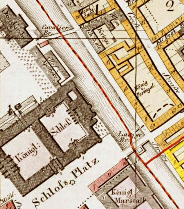 Karte der Berliner Burgstraße gegenüber dem Berliner Stadtschloss, 1846.